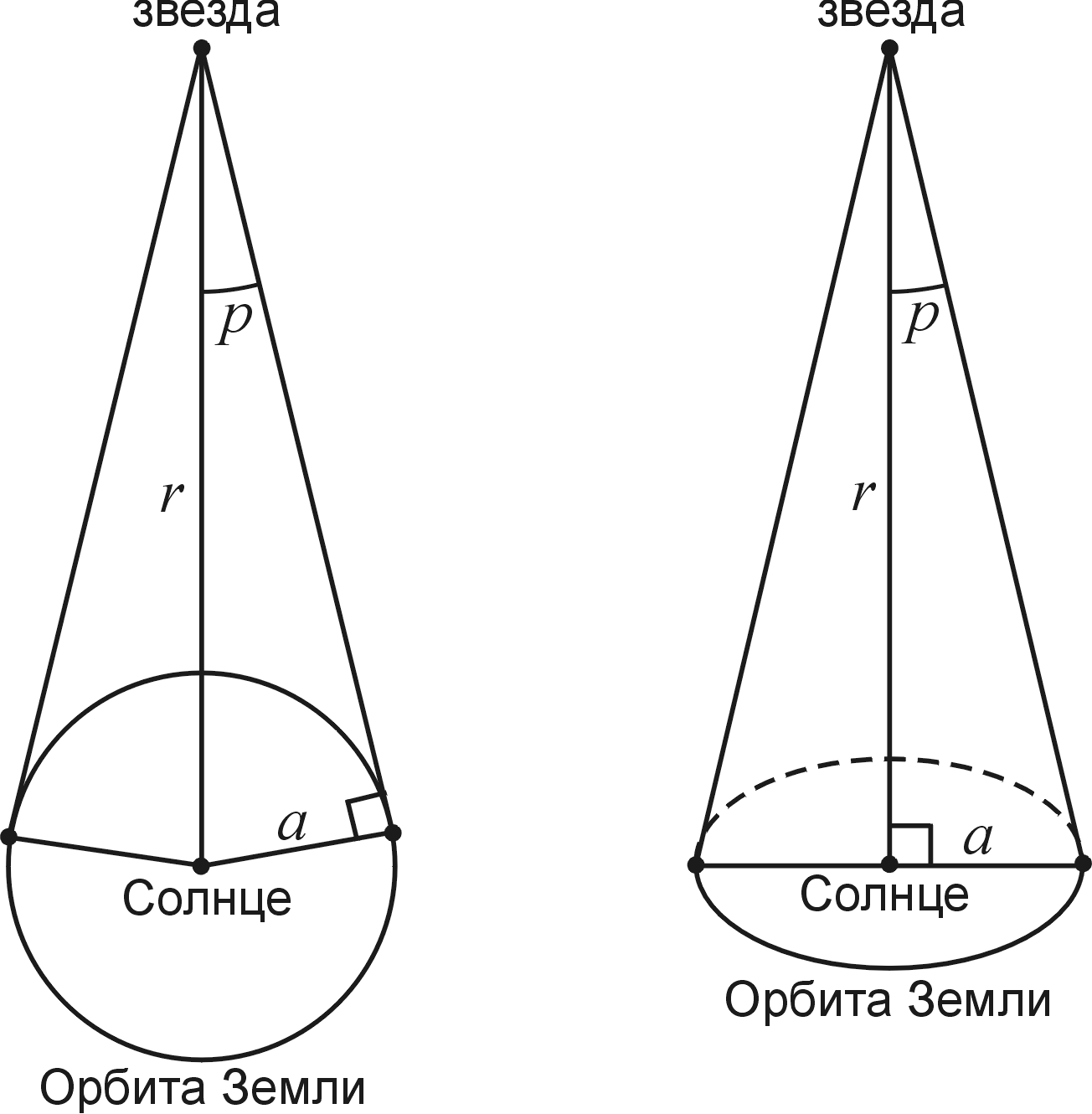 Годичные параллаксы у звезд вблизи плоскости эклиптики (слева) и полюса эклиптики (справа)